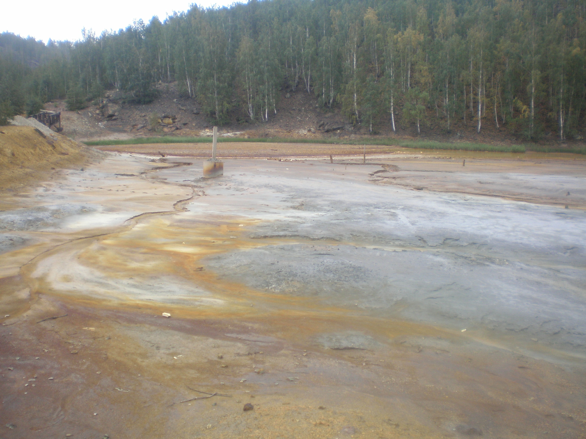 река Сак-Елга Карабаш